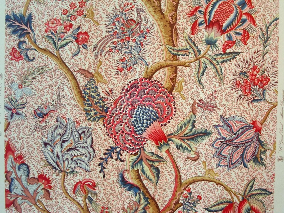 Indienne "Le Grand Corail", musée du textile de Wesserling, Alsace, France